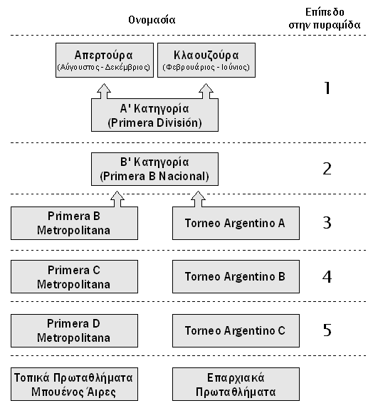 Δομή του Πρωταθλήματος Ποδοσφαίρου Αργεντινής